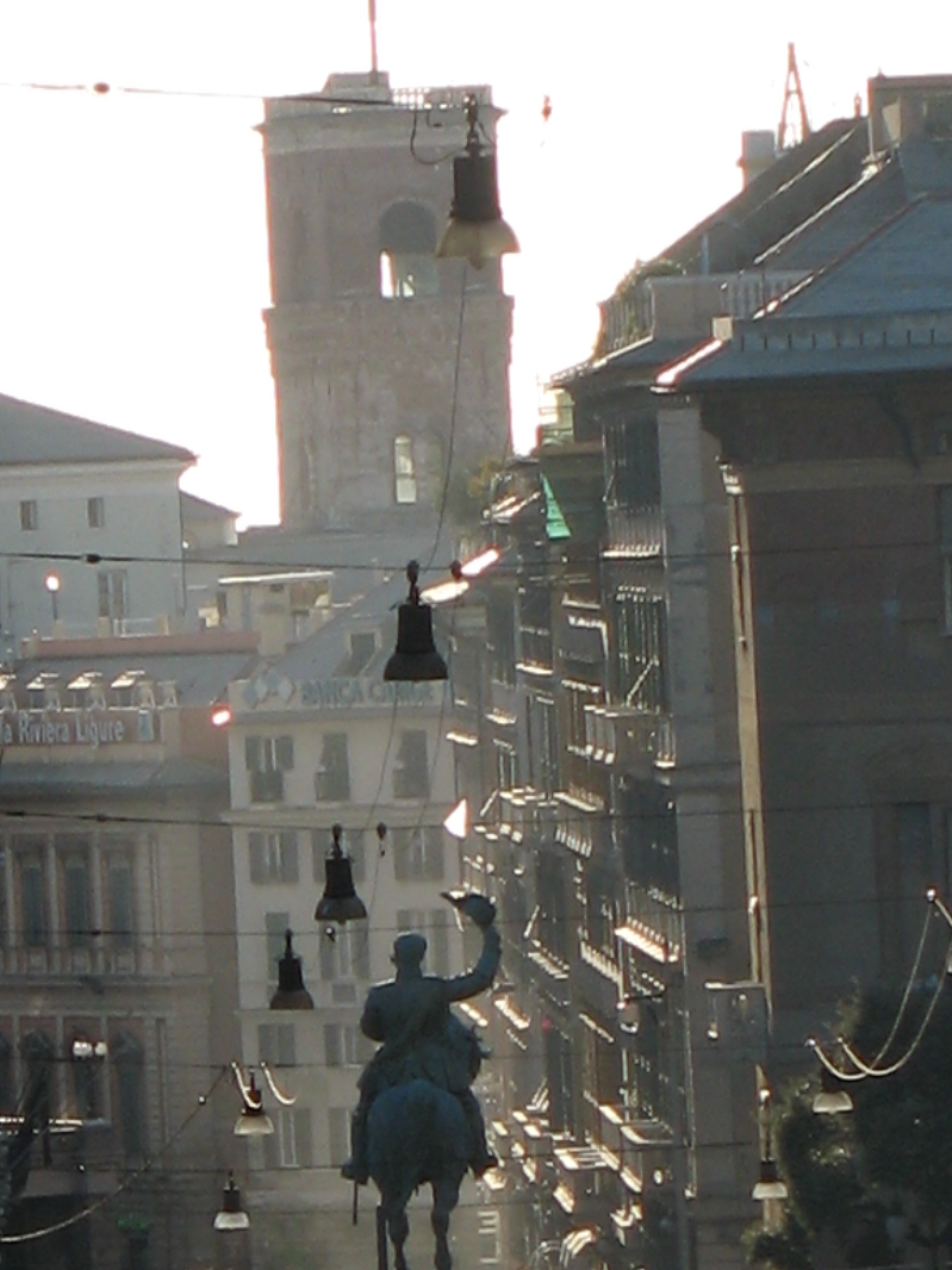 Immagine da Genova - la statua equestre dedicata a Vittorio Emanuele II in piazza Corvetto (vista da via Assarotti).